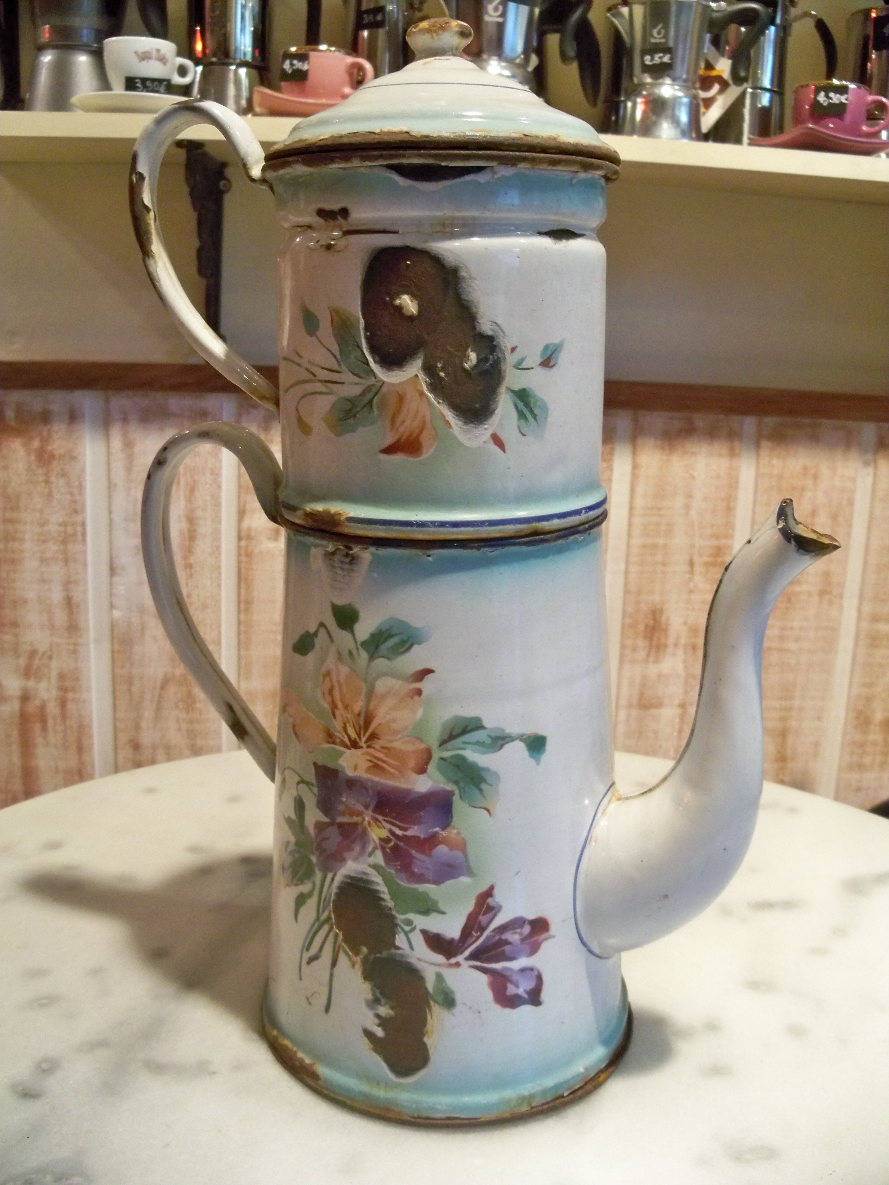 cafetière émaillée